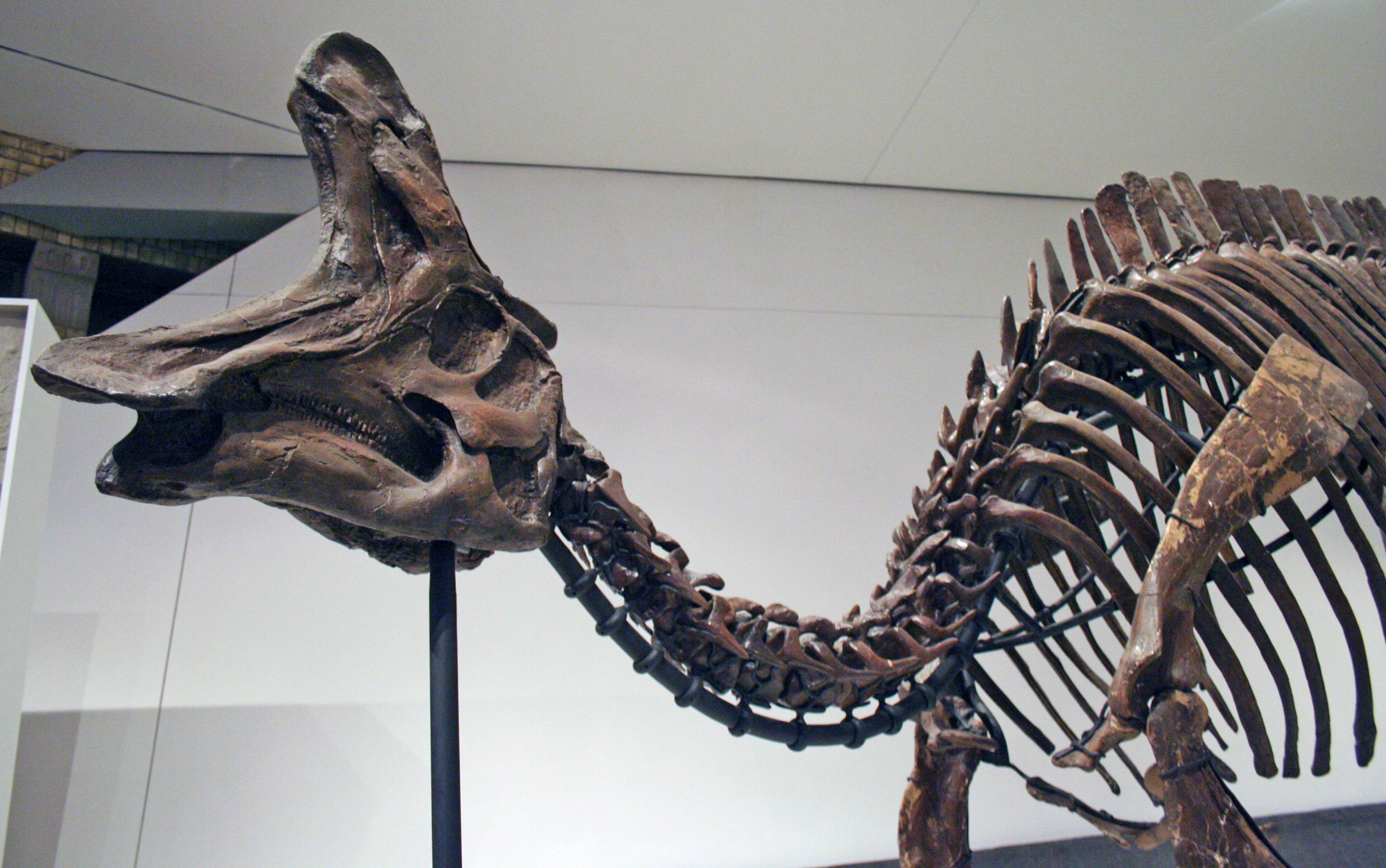 Lambeosaurus lambei specimen ROM 1218.